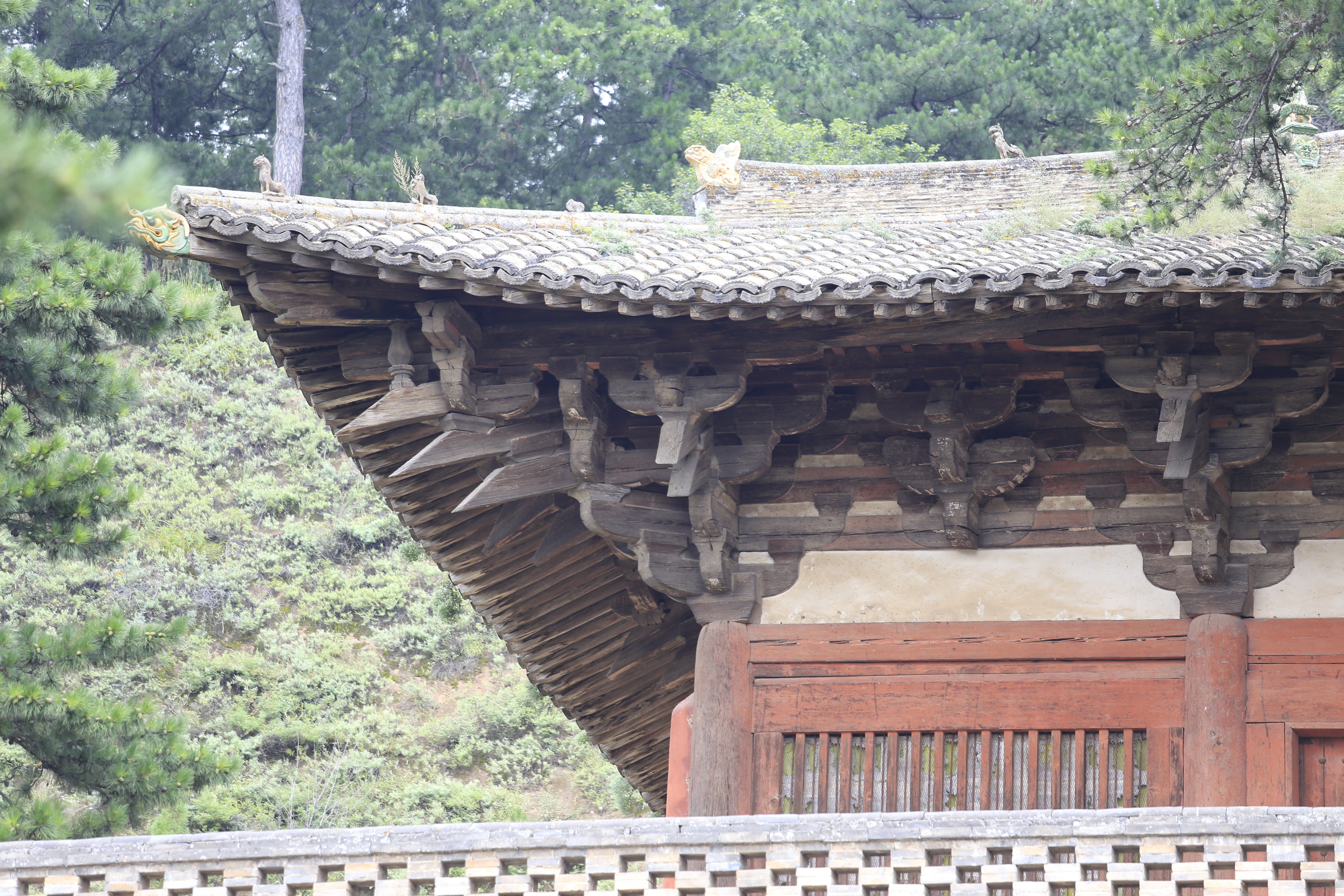 五台佛光寺—— 大殿